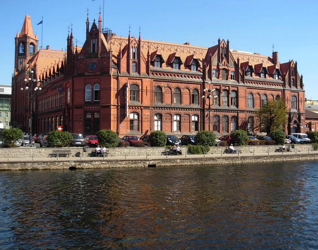 Poczta Główna nad Brdą w Bydgoszczy